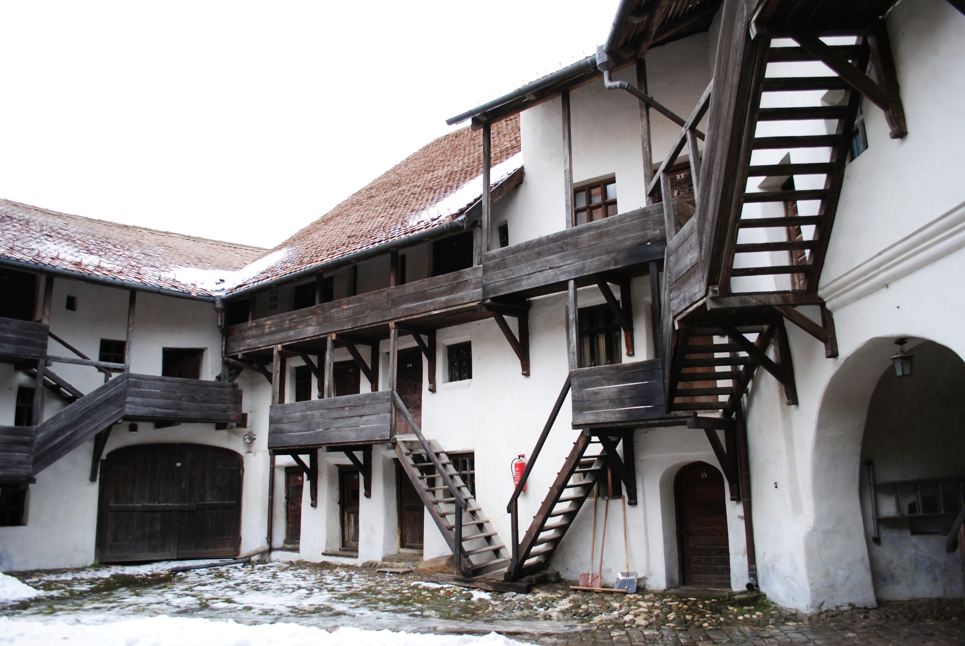 Barbacană (curtea primăriei), cu camere de provizii, anexe, sec. XVI - XVII 04